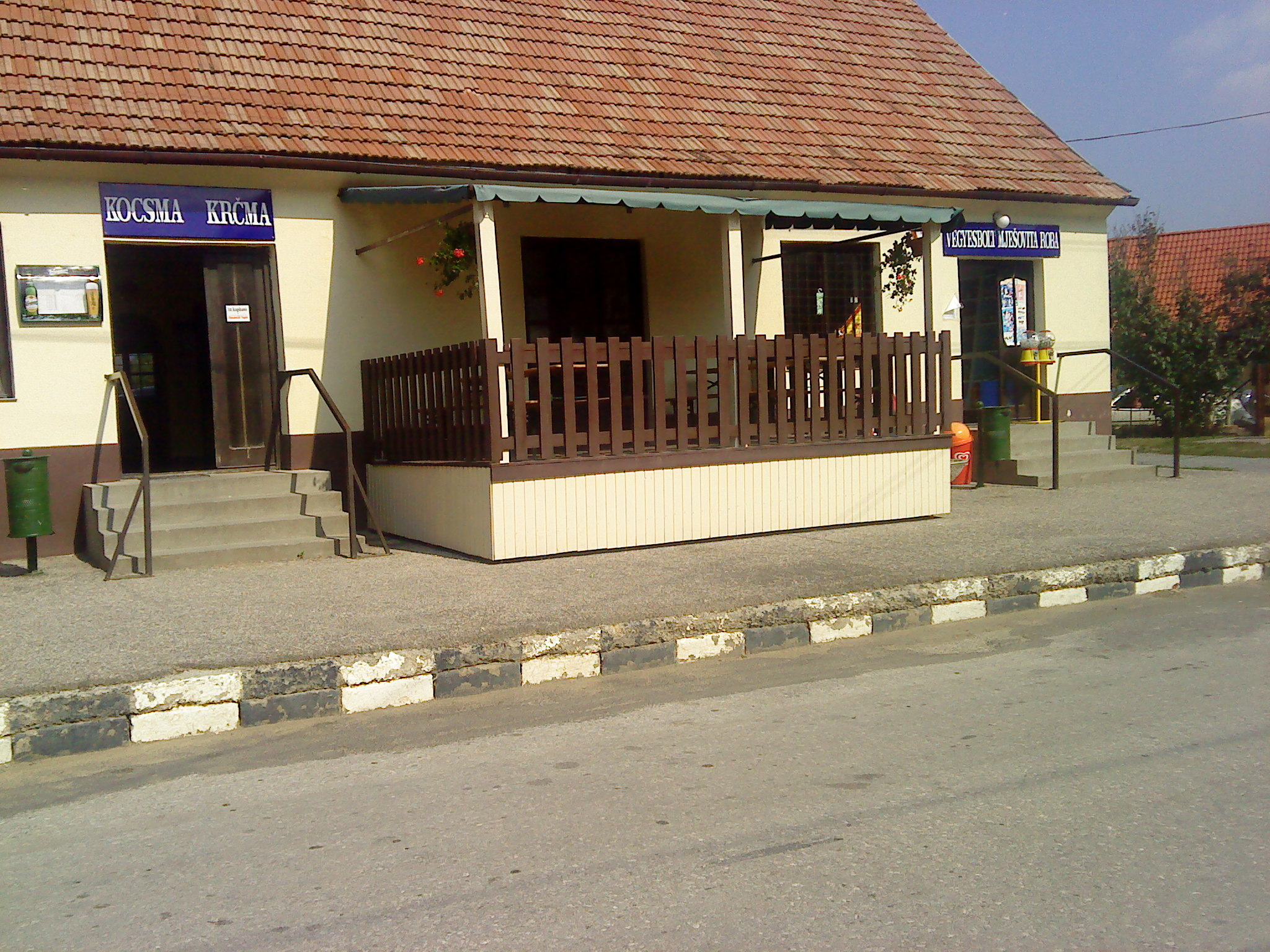 Bolt és kocsma Szemelyben